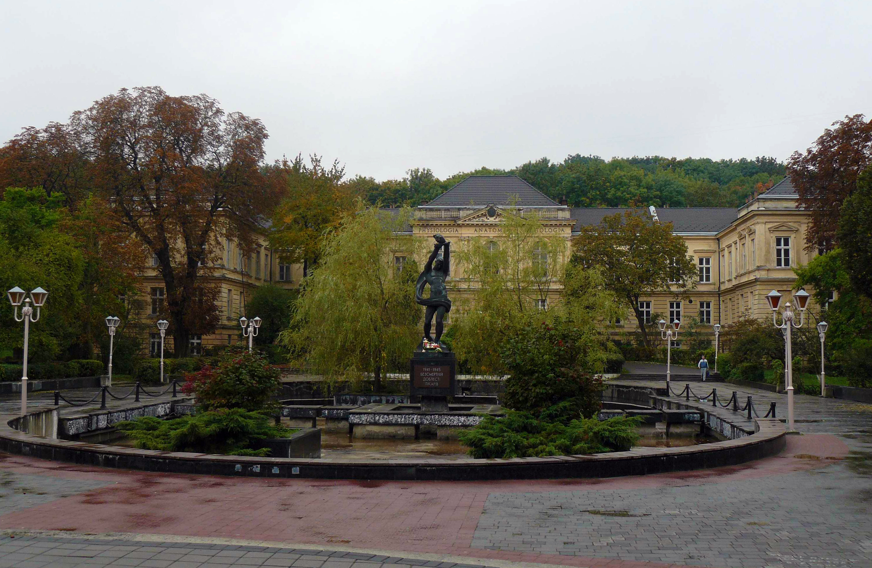 медакадемія, Львів, Пекарська, 52